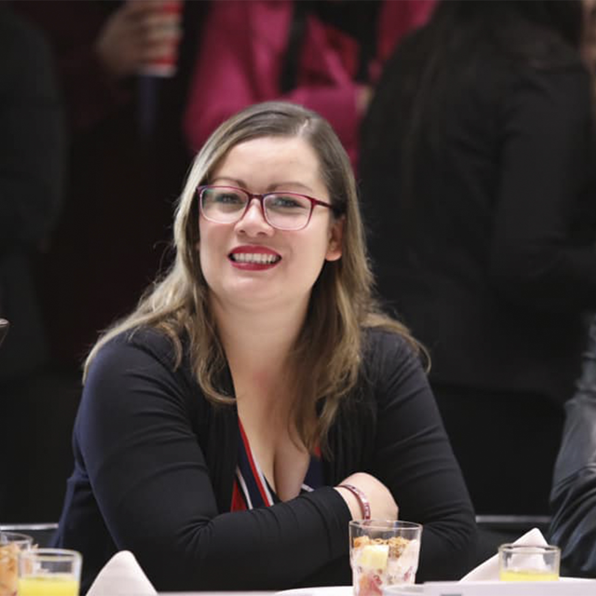 Diputada por Puebla del distrito 8, con cabecera en Chalchicomula de Sesma (Ciudad Serdán); Julieta Kristal Vences Valencia